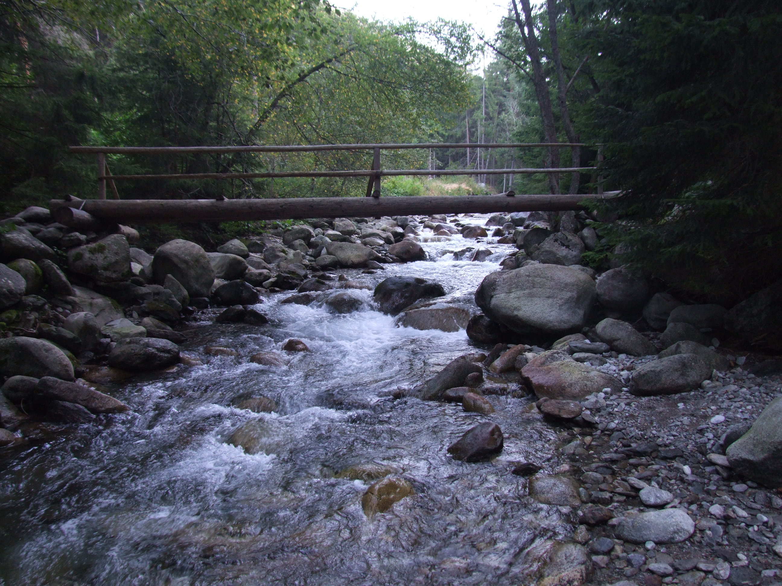 Jałowiecki Potok (Jalovecký potok)